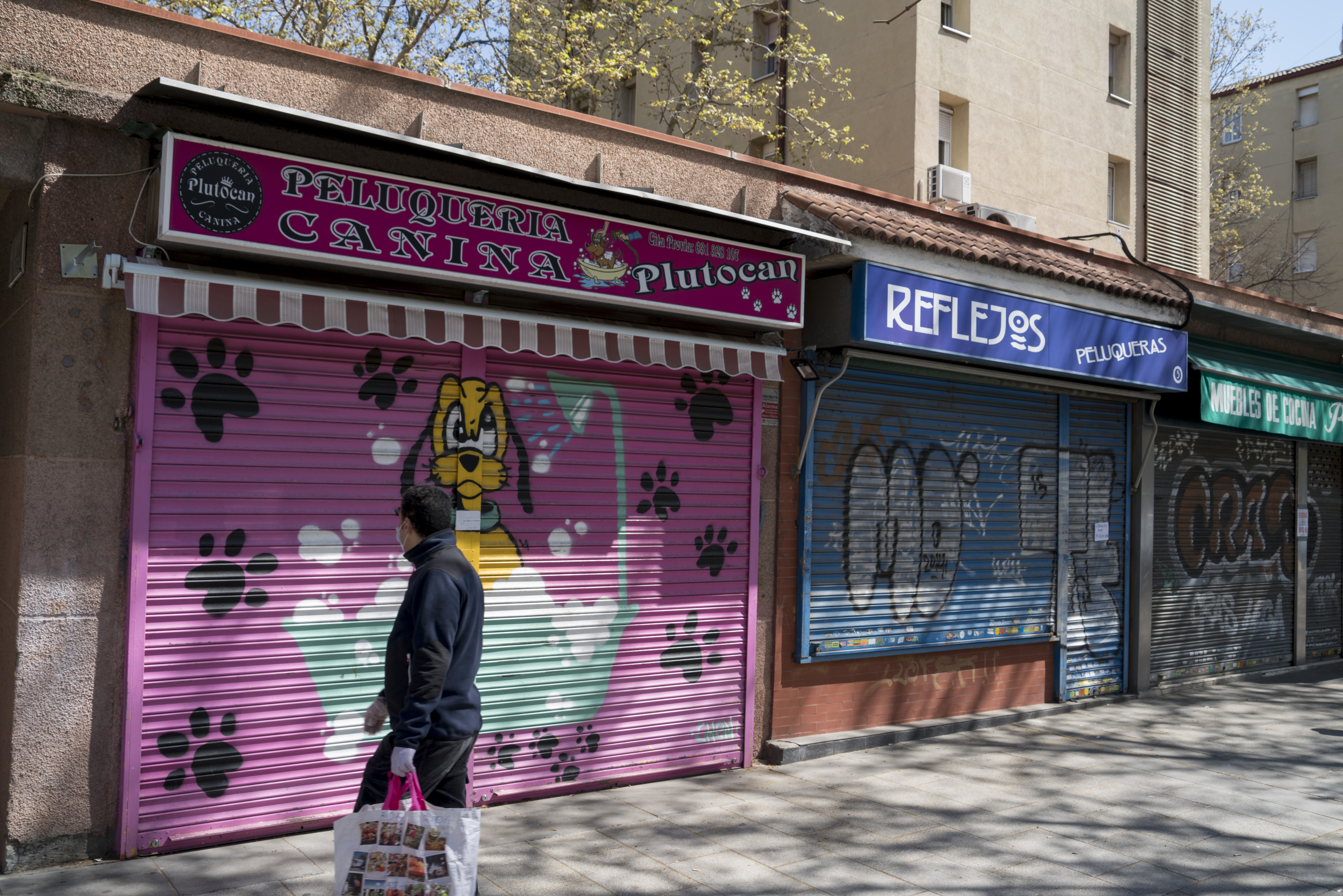 El barrio de San Blas durante la cuarentena por el coronavirus. Madrid, 29 de marzo de 2020.